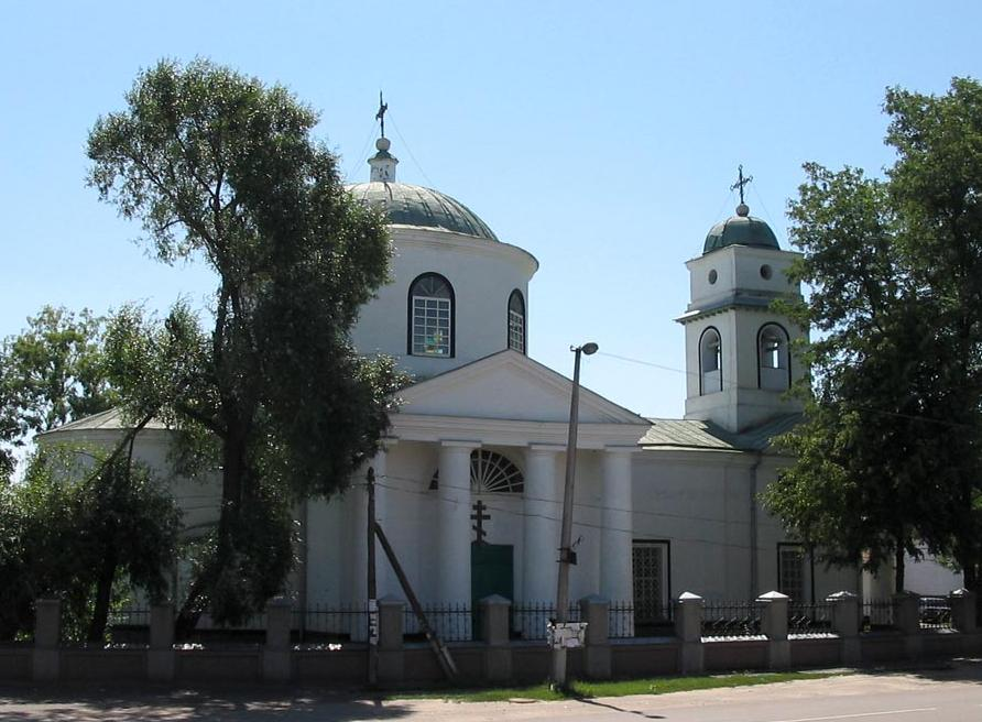 Свято-Троїцька_церква_Котельва_Полтавська_область.jpg: Свято-Троїцька церква у смт Котельві Полтавської області (серпень 2007)